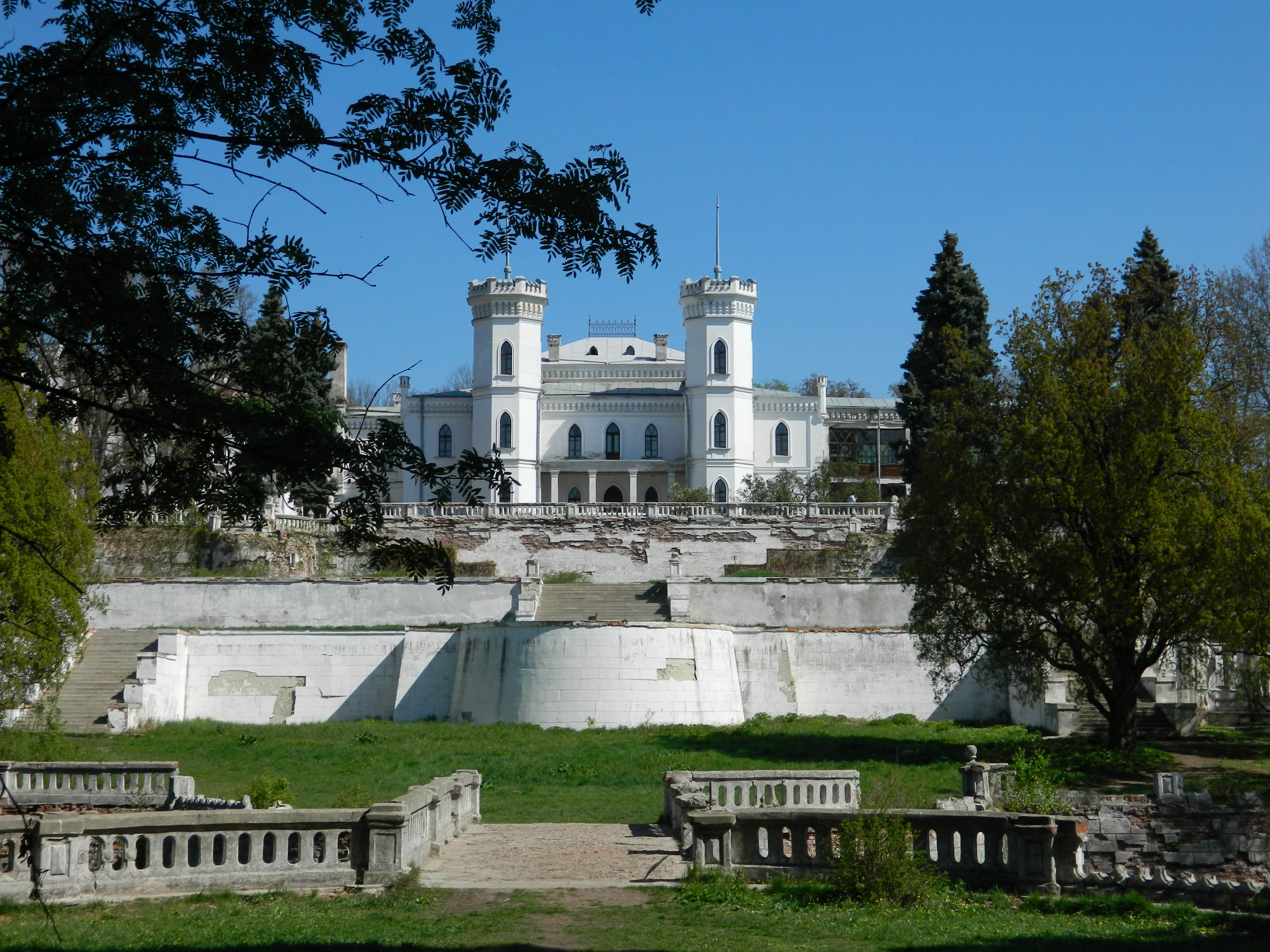 Парк-пам'ятка садово-паркового мистецтва - територія тубсанаторію «Шарівка» у смт. Шарівка, Богодухівський район, Харківська обл.